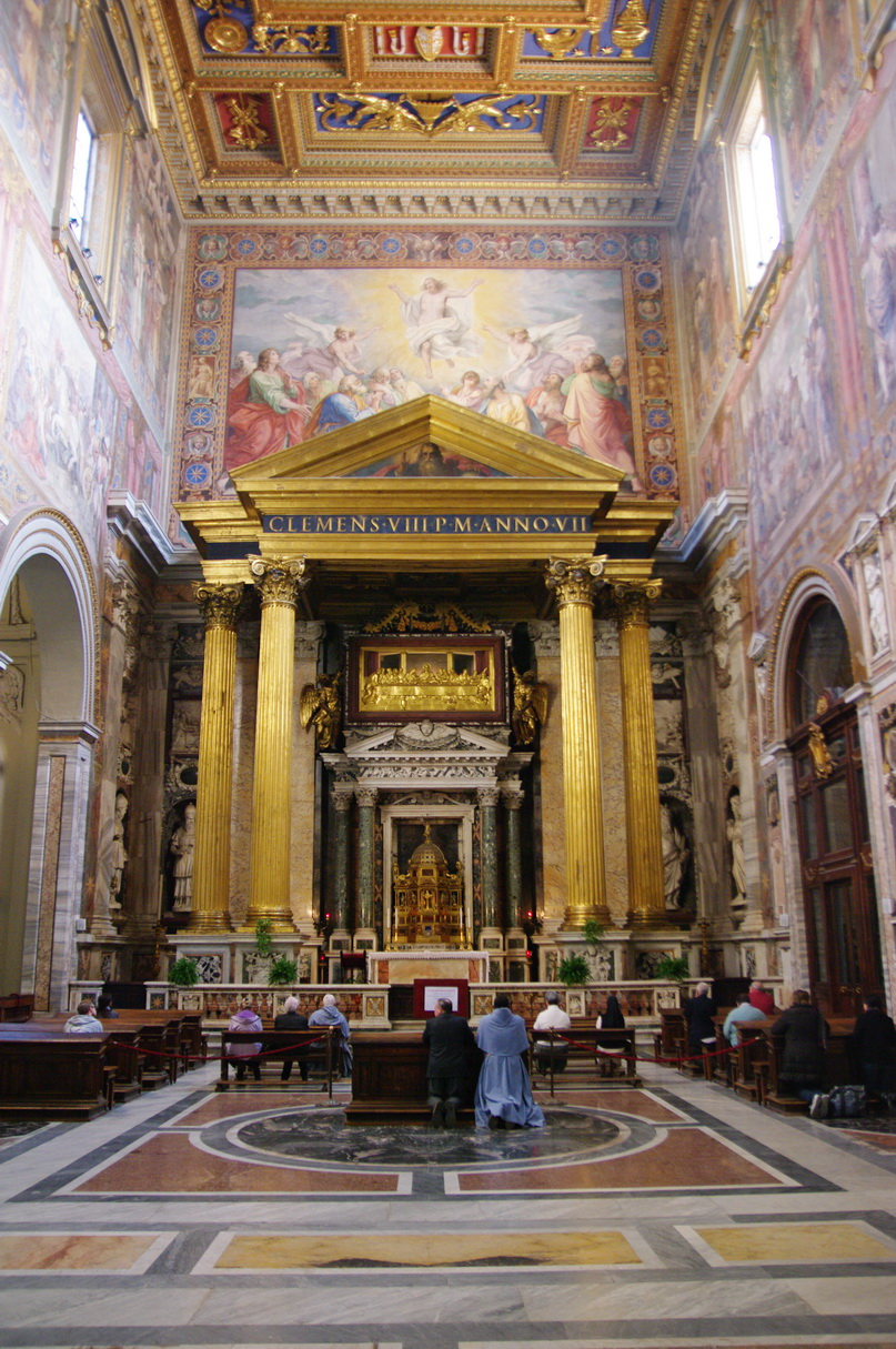 Seitenaltar Lateranbasilika, Rom